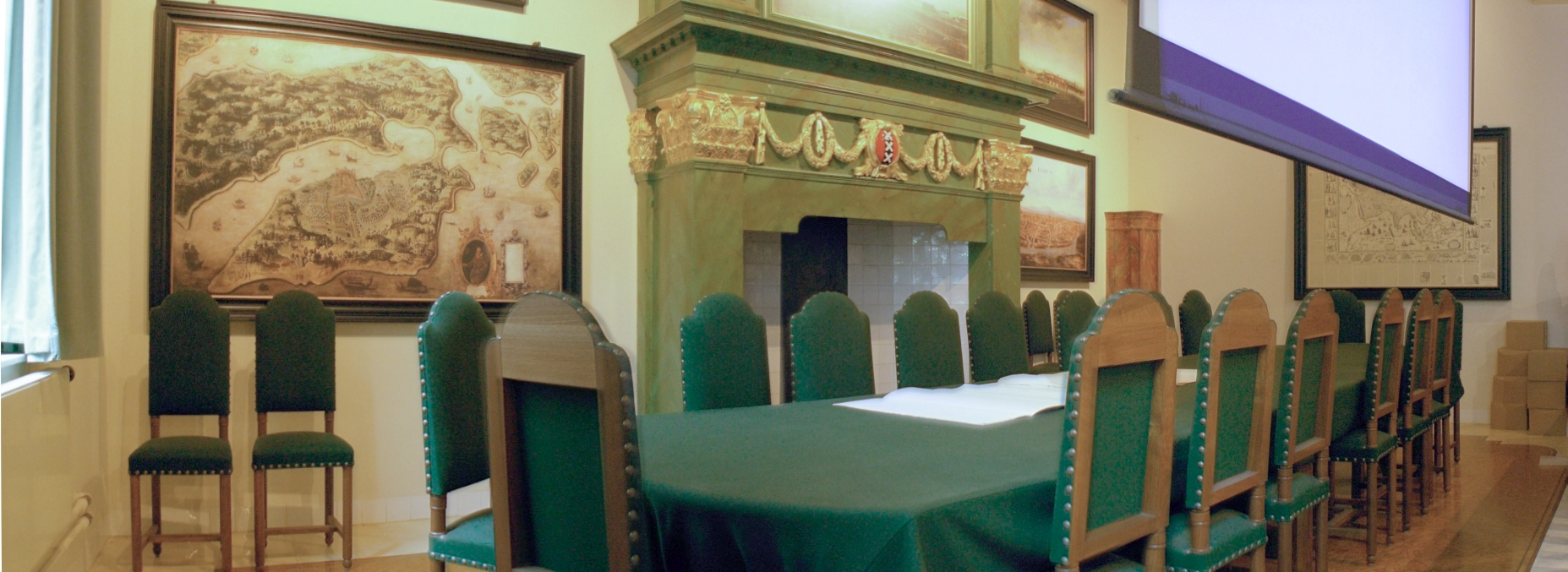 Panoramafoto, eigen werk, foto's gemaakt 16 nov-2007, gecompileerd 18 nov. Te zien is het gedeelte van de directiekamer waar de tafel met de 17 stoelen staat ("de Heeren XVII") van de voormalige VOC in het VOC-gebouw (hoek Kloveniersburggracht-Nwe Hoogstraat Amsterdam).